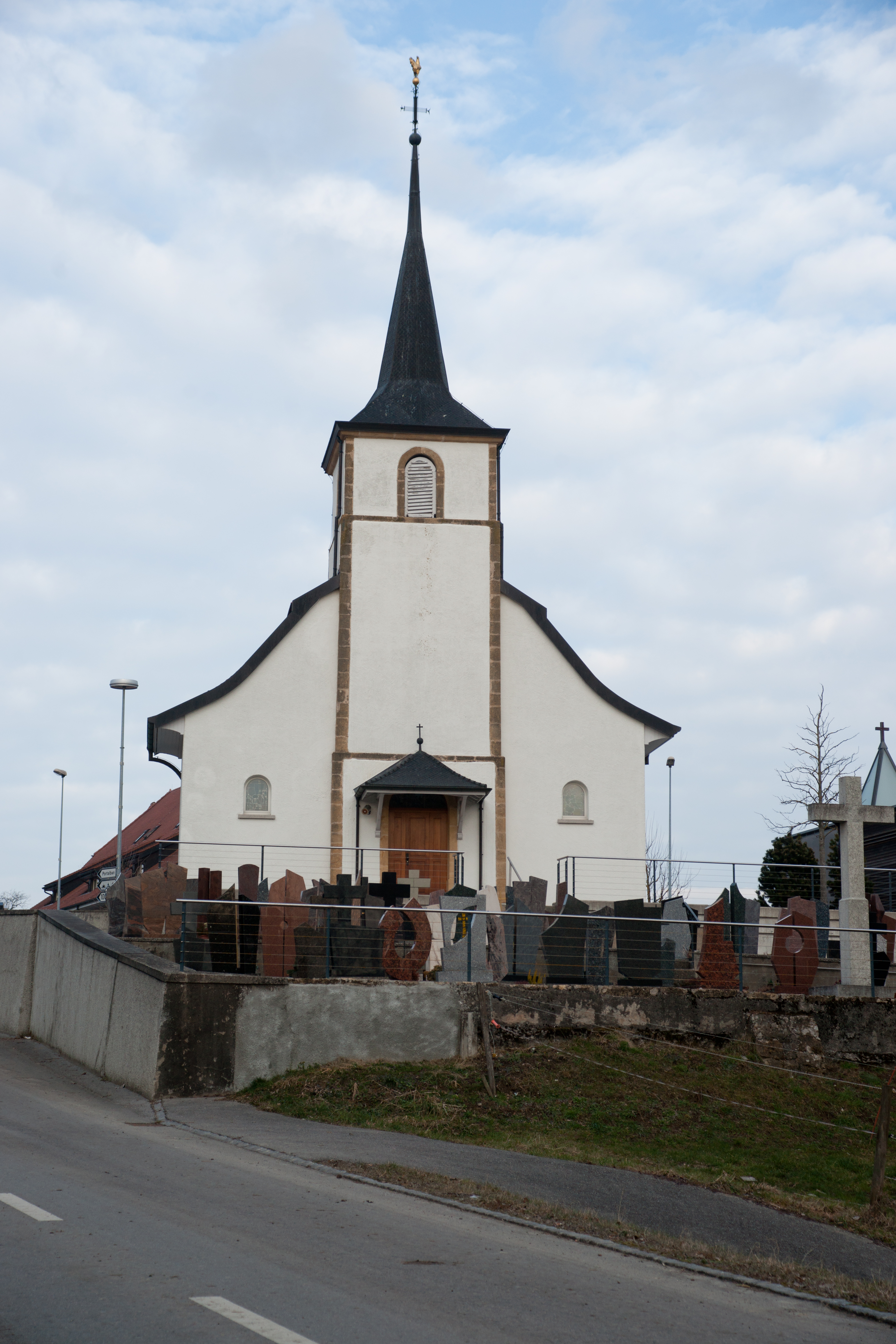 église de Delley-Portalban